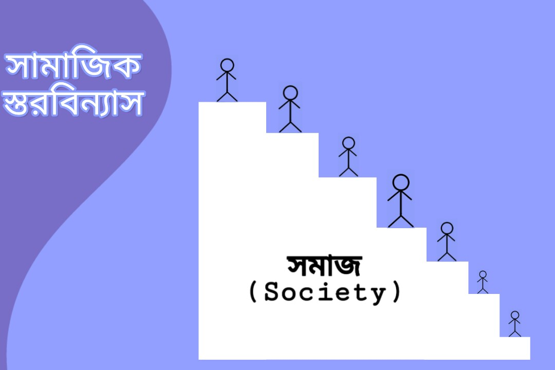 সামাজিক স্তরবিন্যাসের নমুনা চিত্র